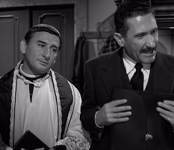 screenshot da La nonna Sabella (1957) catturato personalmente